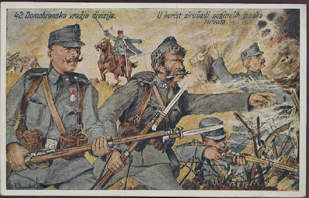 prikaz 42. vražje divizije na dobrotvornom omotu šibica, za obitelji palih vojnika